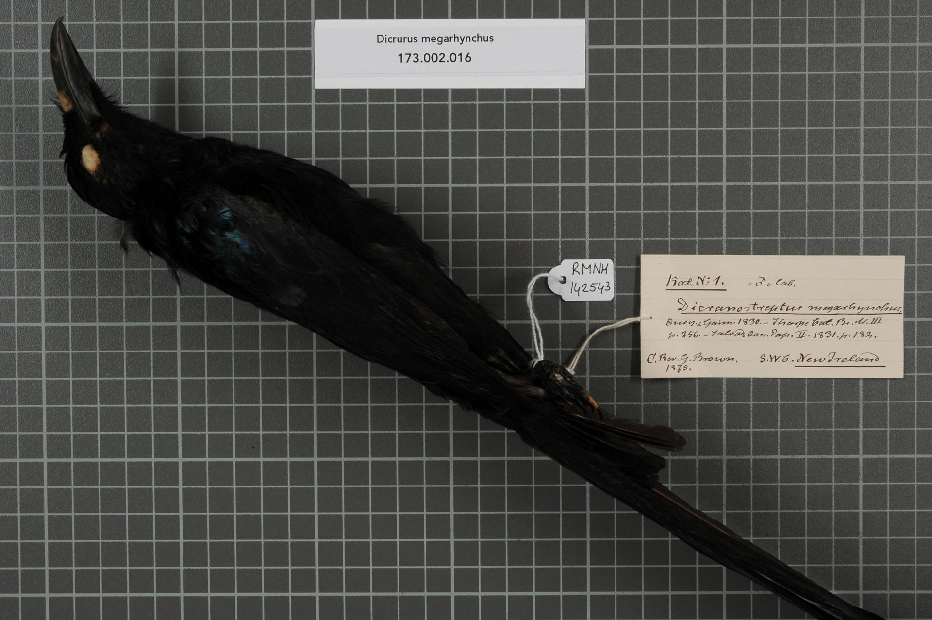 Dicrurus megarhynchus (Quoy and Gaimard, 1830)